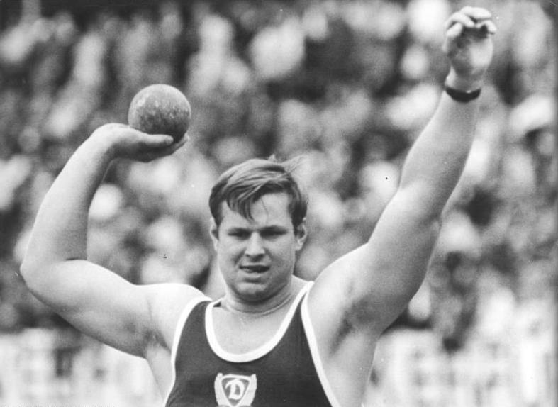 Hartmut Briesenick Zentralbild Demme 05.07.1970-str-Erfurt: XXI.DDR-Leichtathletik-Meisterschaften vom 03.-05.07.1970 - 3.Tag-Mit guten 20,27 m wurde Hartmut Briesenick (SC Dynamo Berlin) DDR-Meister im Kugelstoßen der Herren vor Dieter Grabe (SC Cottbus) , der sich auf 19,96 m steigerte, und Heinz.Joachim Rothenburg (SC Dynamo Berlin) mit 19,88 m.